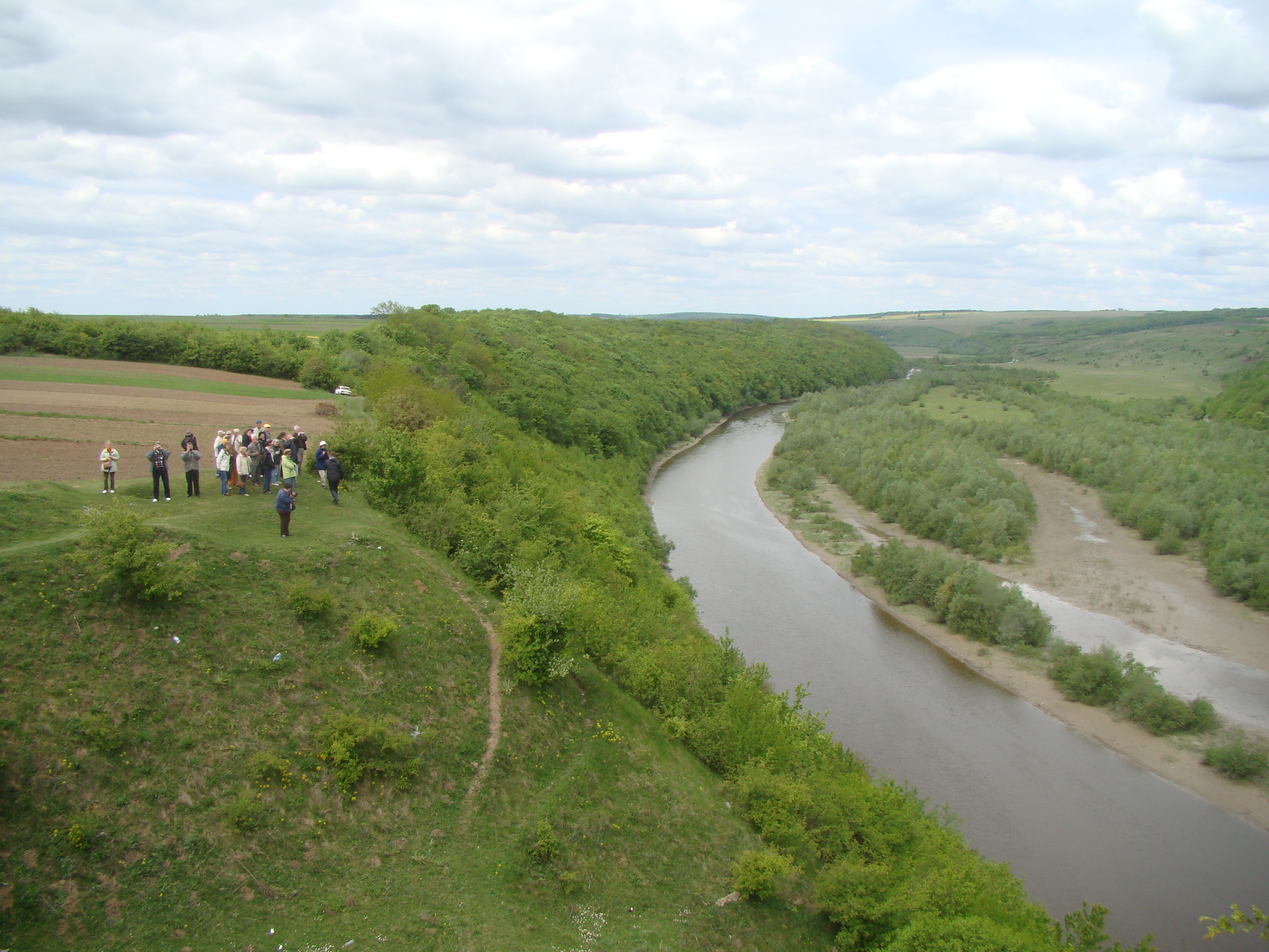 Rodzinne korzenie Boruty - powiat Borszczów i rzeka graniczna Zbrucz. W czasie zaborów granica austriacko-rosyjska, w II RP polsko-rosyjska.a na południu na Dniestrze polsko-rumuńska.